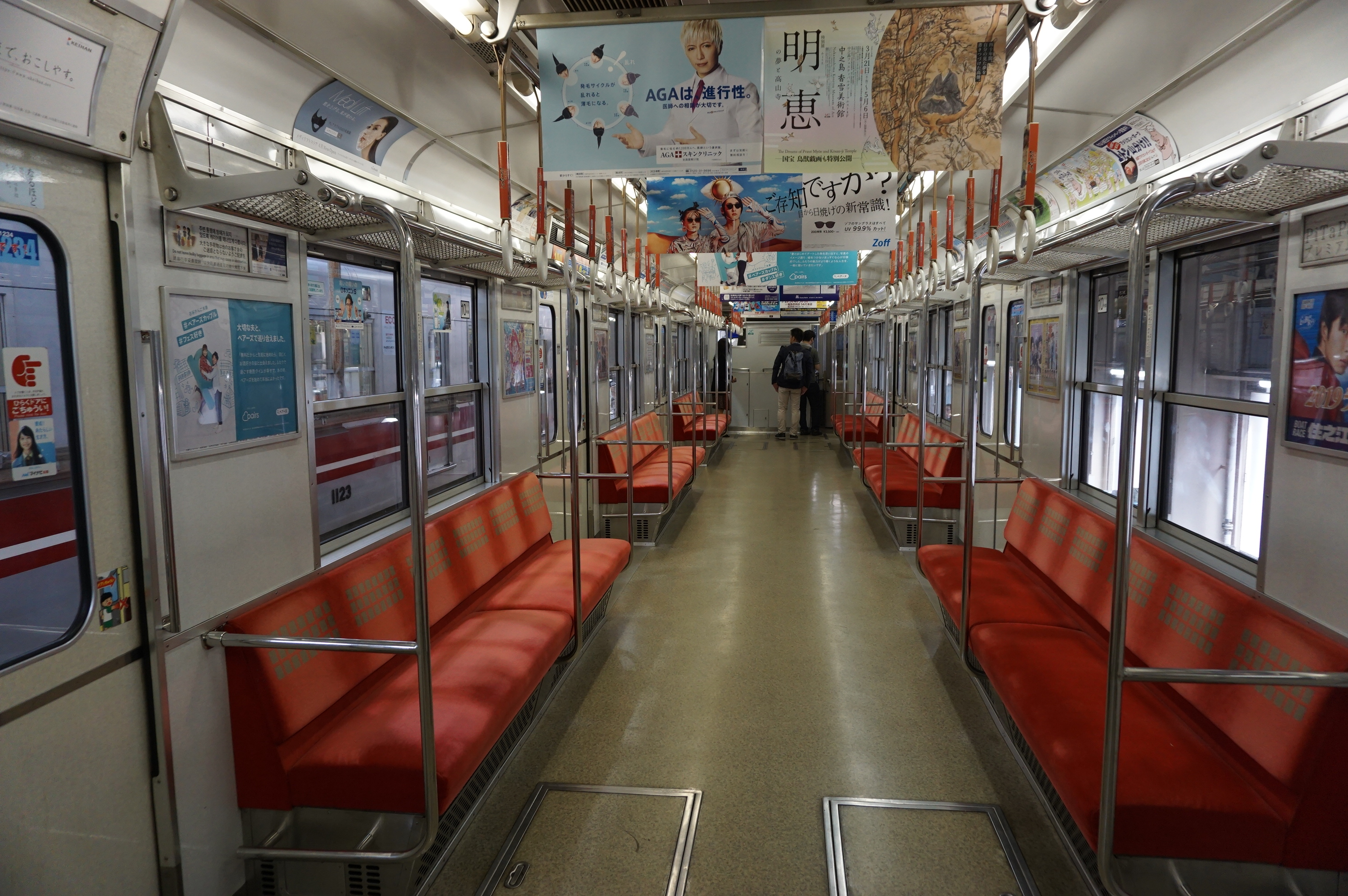 2019年5月中百舌鳥検車場一般公開にて撮影Sony ILCE-6000